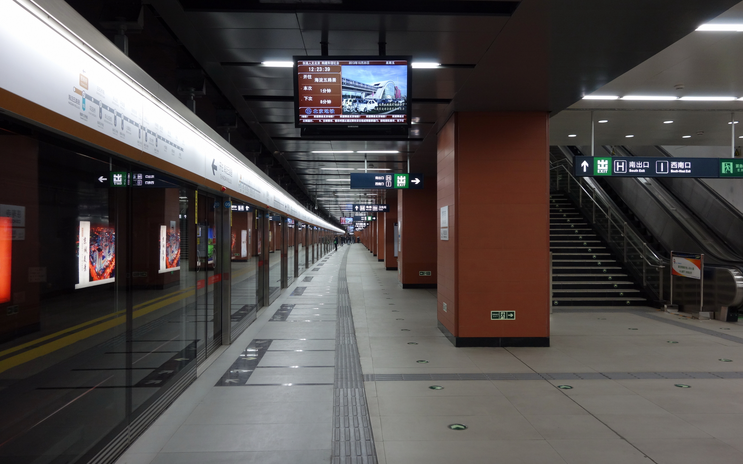 慈寿寺6号线站台，往海淀五路居站方向一侧带弯度的站台。